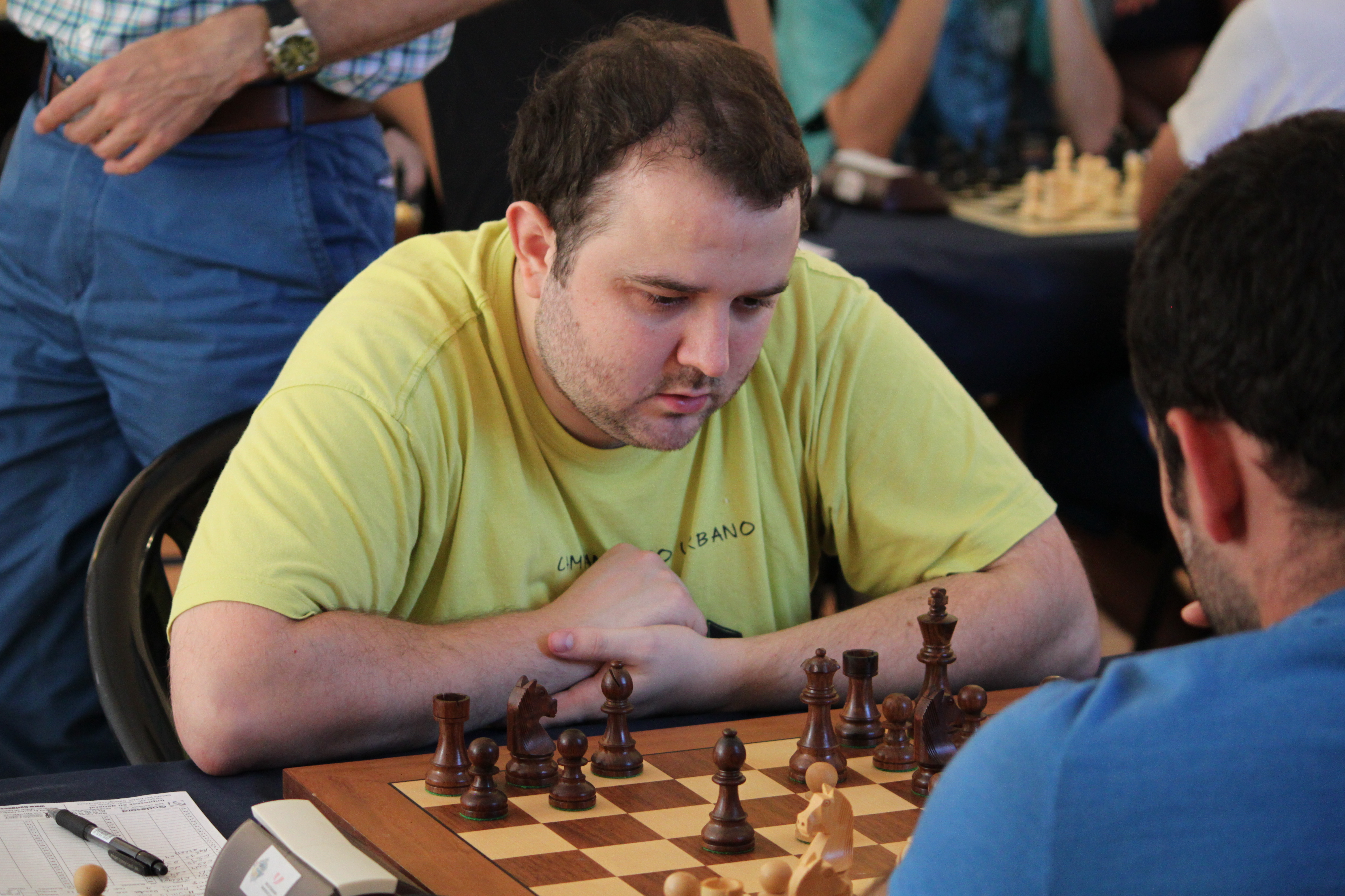 El Mestre Internacional d'escacs Mikel Huerga al XVI Obert de Figueres 2015